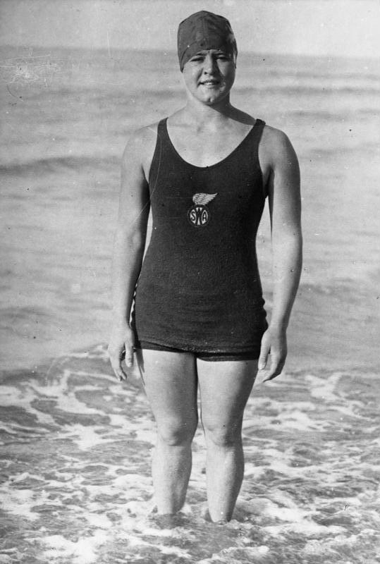 Die Amerikanerin Gertrud Ederle durchschwimmt den Ärmel-Kanal in 14 1/2 Std. (Erste autentische Aufnahme nach ihrer Ankunft in England). Gertrud Ederle, die erste Frau, welche den Ärmel-Kanal in der Recordzeit von 14 1/2 Stunden durchschwamm, auf dem englischen Boden.